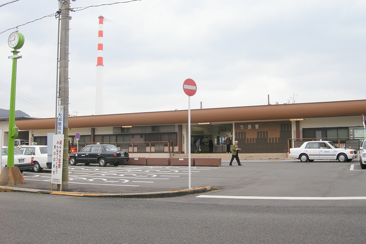 竹原駅 Takehara station